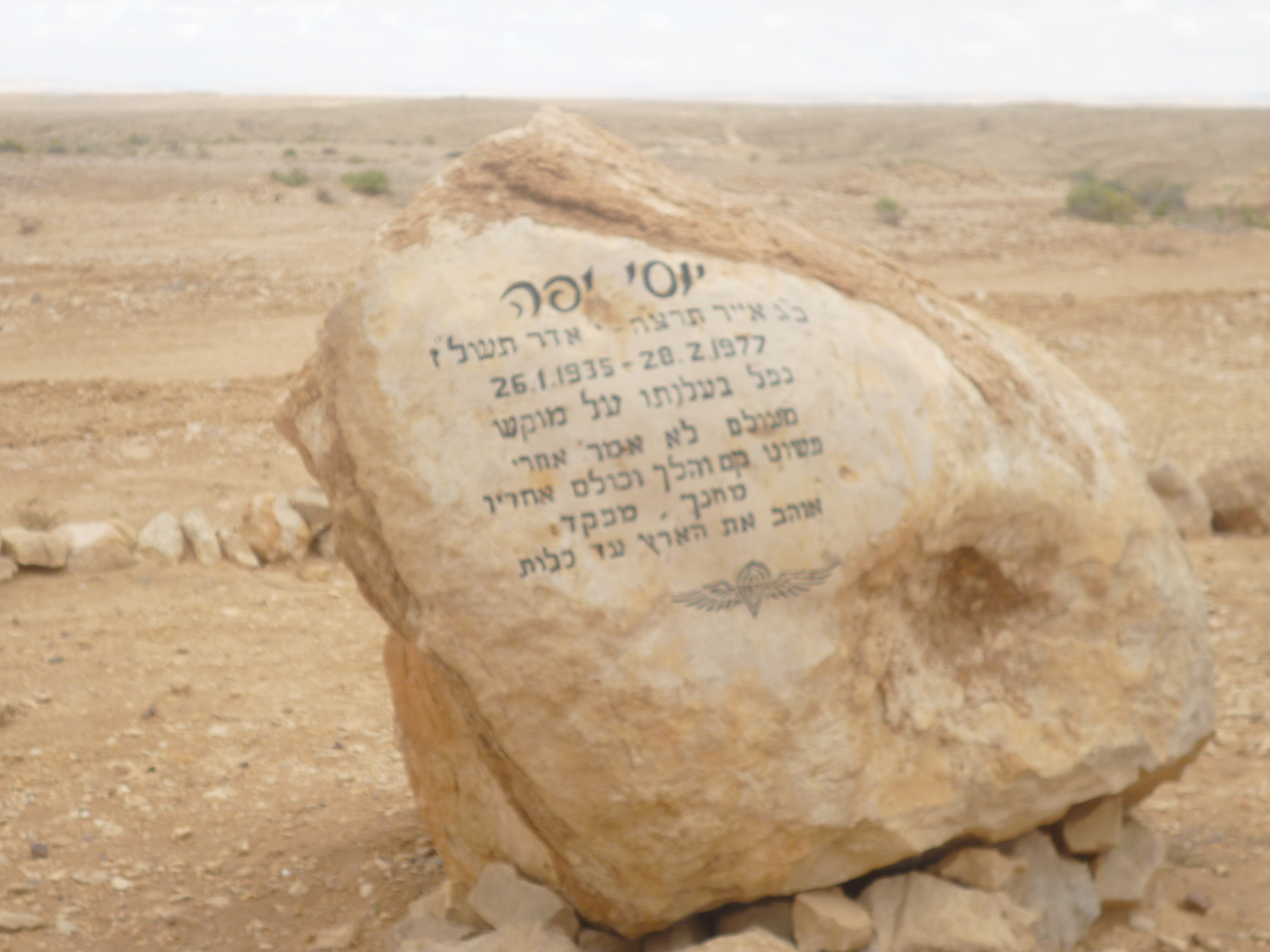 מבט לעבר מדבר סיני מגבול ישראל מצרים צמחיית ניצנה ליד כביש 10 האנדרטה לזכר יוסי יפה